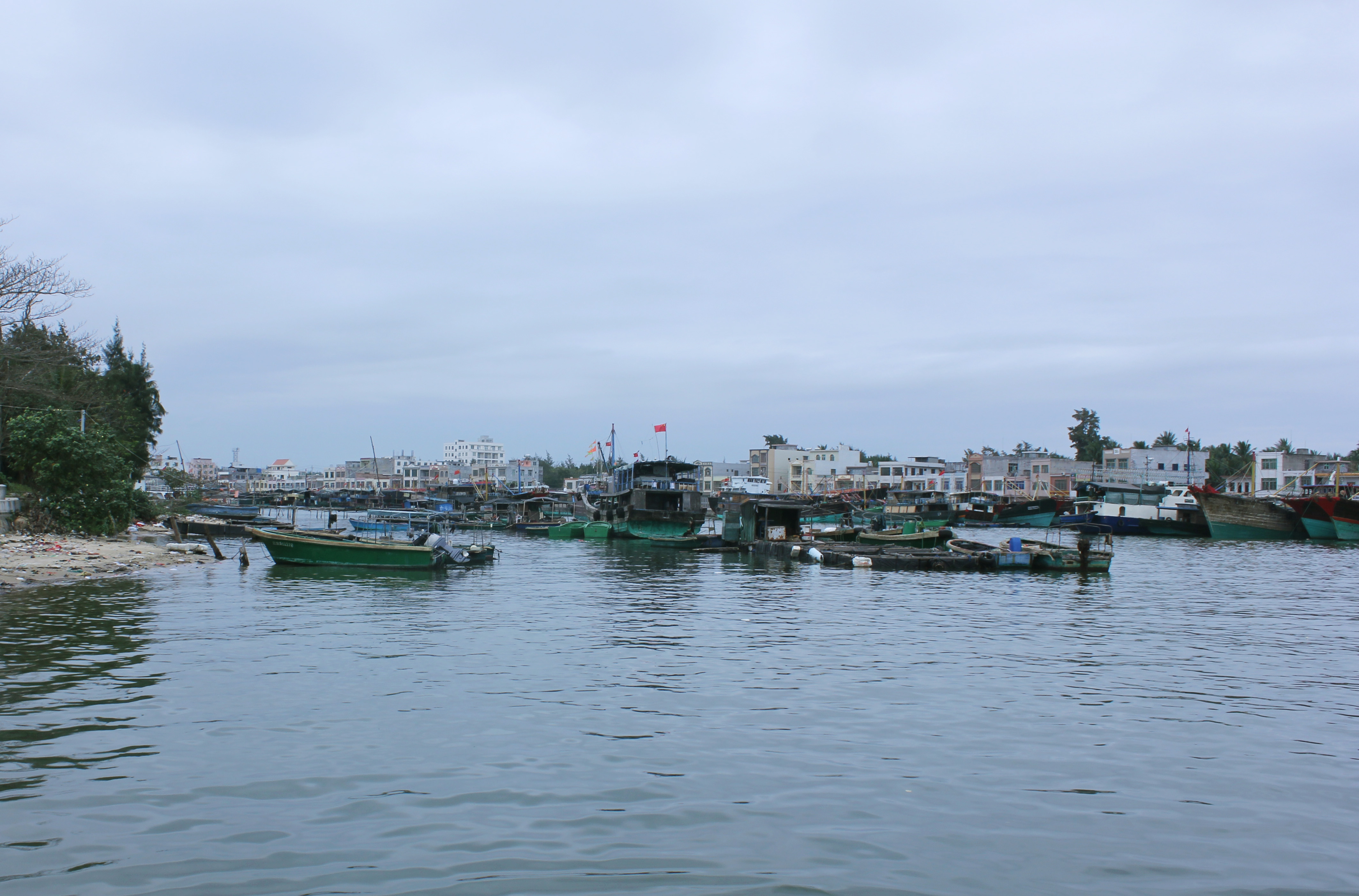 中国海南省潭门港，拍摄于南岸排港村的渡口。